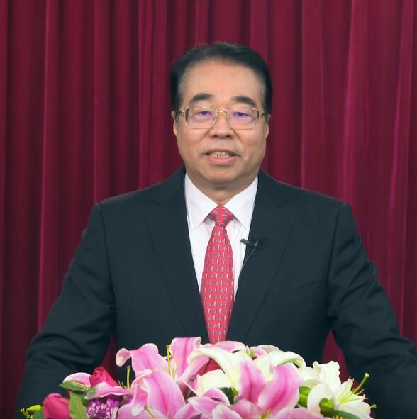 国务院侨办主任许又声